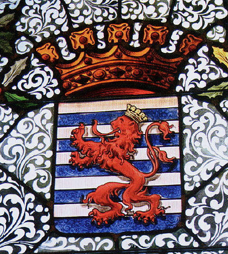 Les vitraux à l'hôtel de ville d'Arlon (province de Luxembourg, Belgique). Les armoiries officielles de la ville d'Arlon, fixées par arrêté royal le 24 novembre 1841, sont « burelées d'argent et d'azur au lion de gueules, la queue fourchue, couronné d'or, brochant sur le tout, l'écu timbré d'une couronne d'or ». Les armoiries sont celles d'Henri le Blond du duché de Luxembourg (fils de Waléran III et d'Ermesinde). La ville d'Arlon les a adoptées, avec comme brisure distinctive la couleur de la langue et des griffes du lion qui sont de gueules au lieu d'être d'or. Ce blason est différent du sceau de la ville d'Arlon qui est encore celui utilisé pour les bulletins communaux, les sites de la ville... et qui date du XVIe siècle avec l'inscription « S. Secretum oppidi arlunensis ».